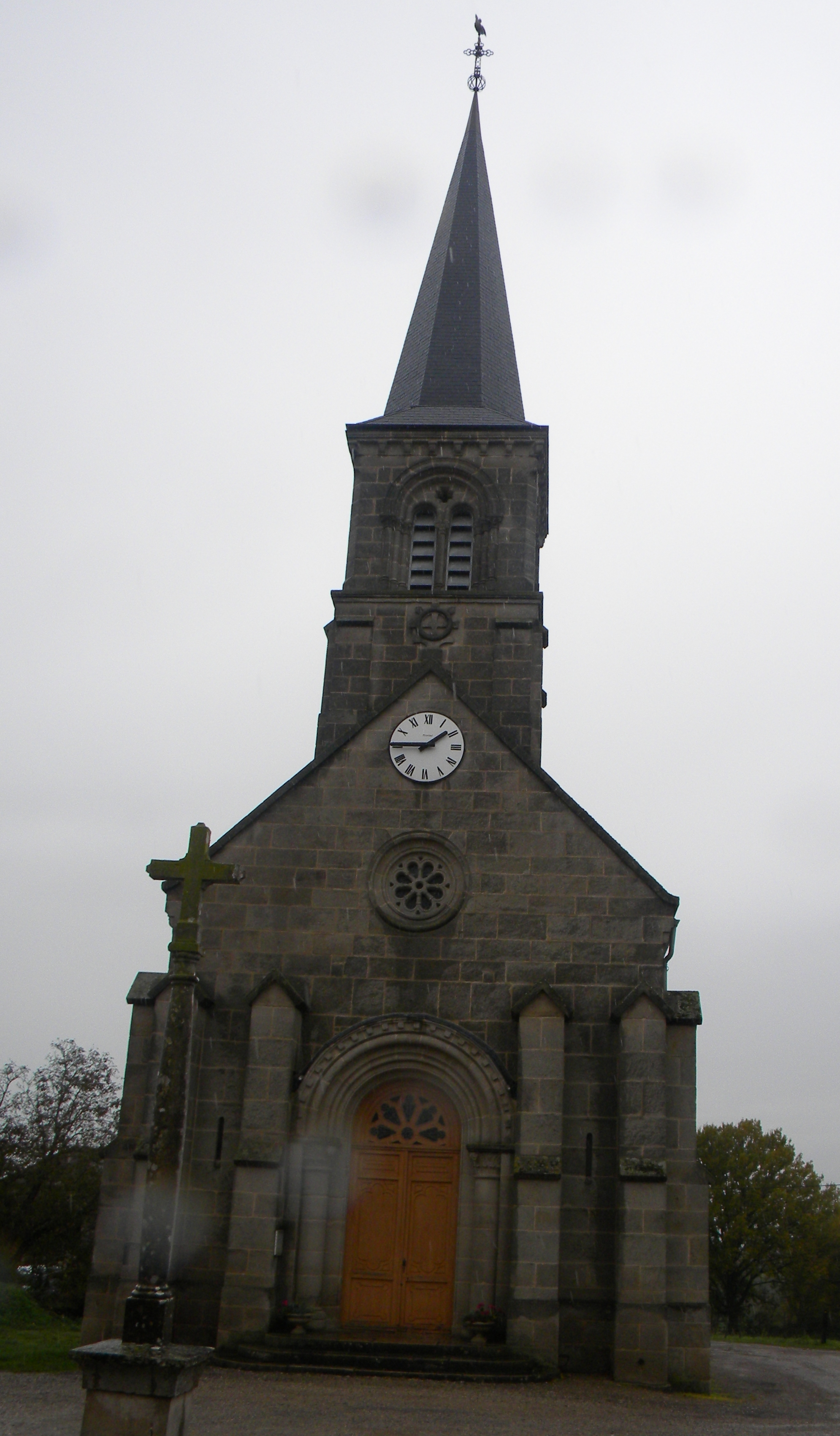 Eglise d'Aubigny-la-Ronce